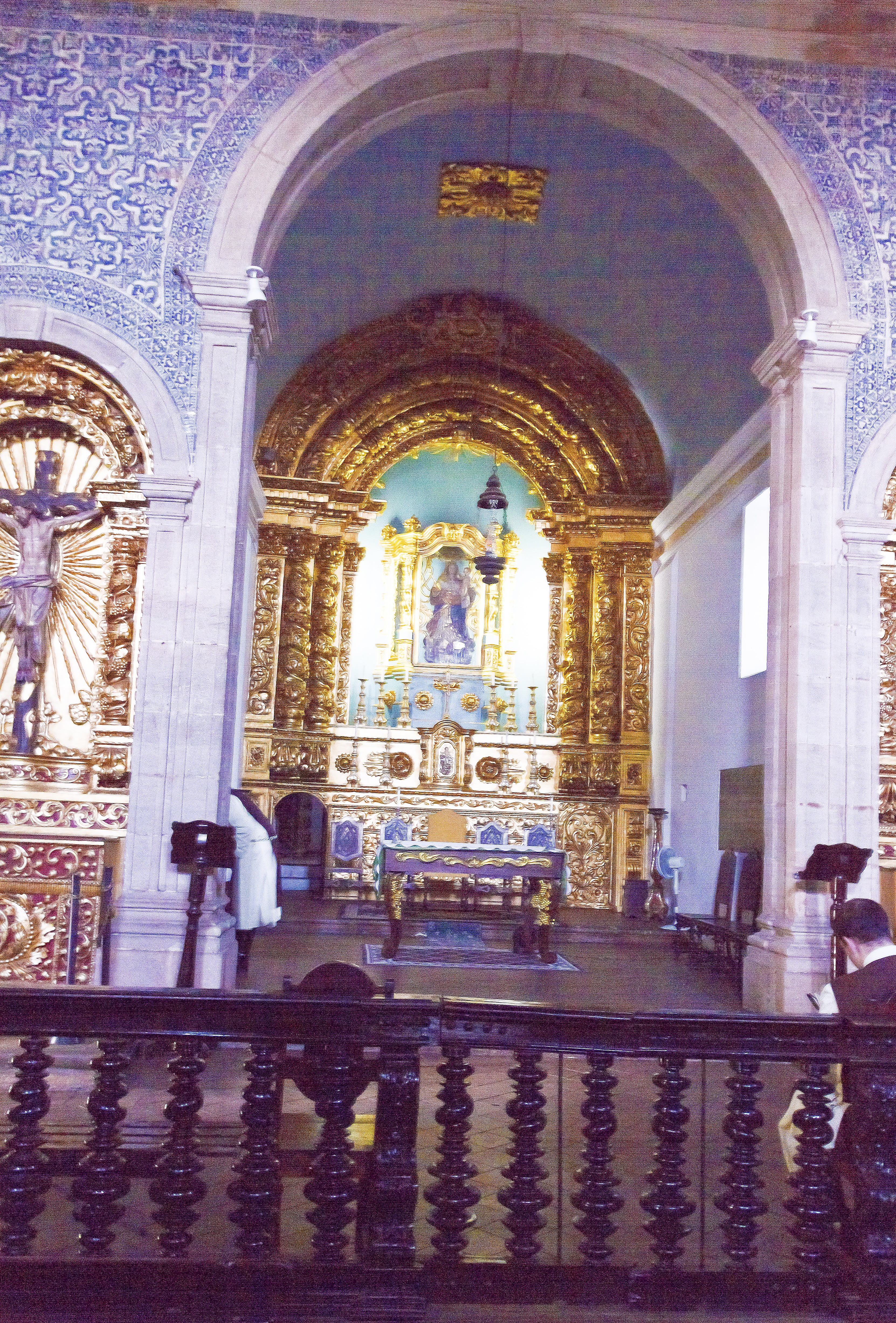 Igreja de Nossa Senhora dos Prazeres dos Montes Guararapes - Jaboatão dos Guararapes, Pernambuco, Brasil